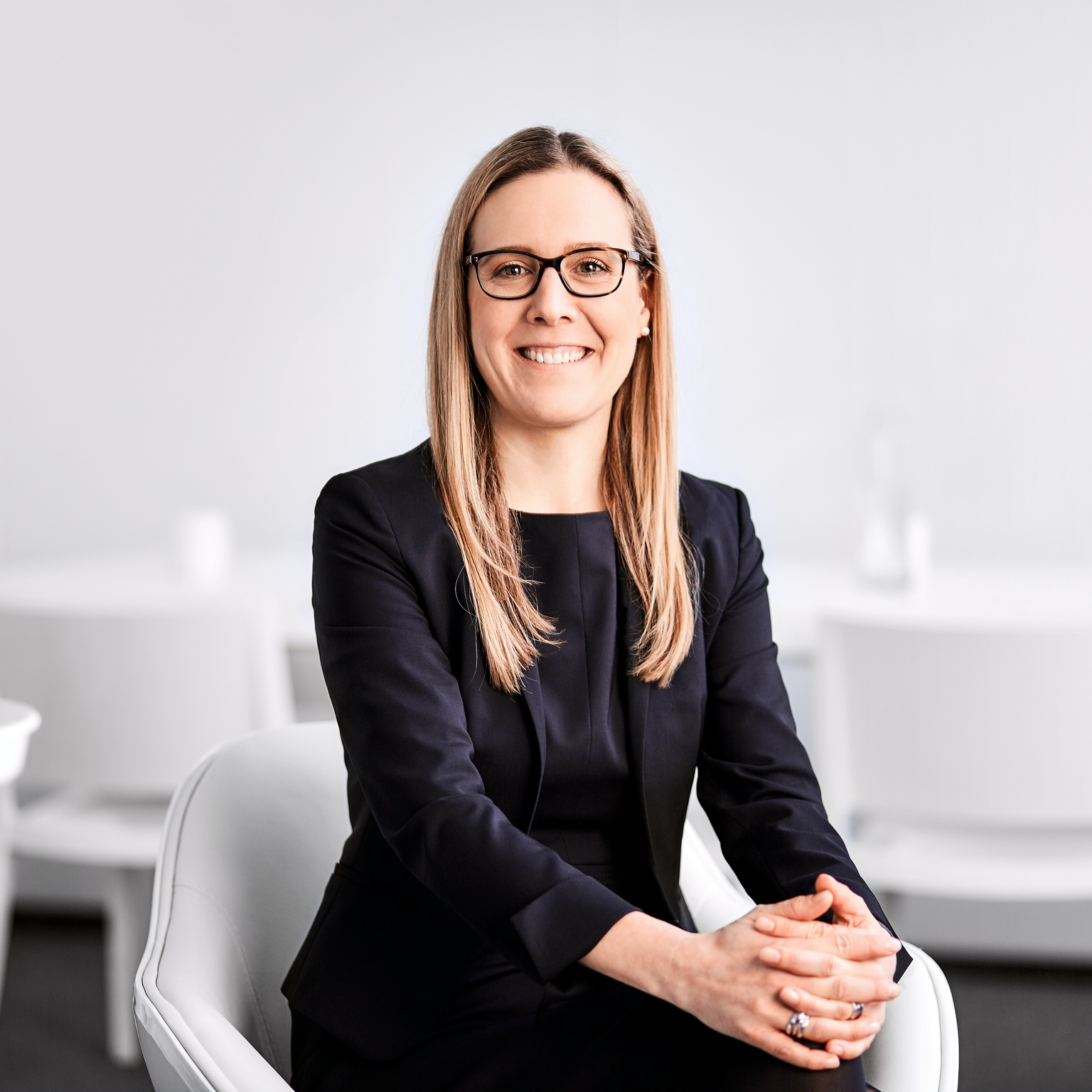 Frauke Hegemann, Vorstandsvorsitzende der comdirect bank